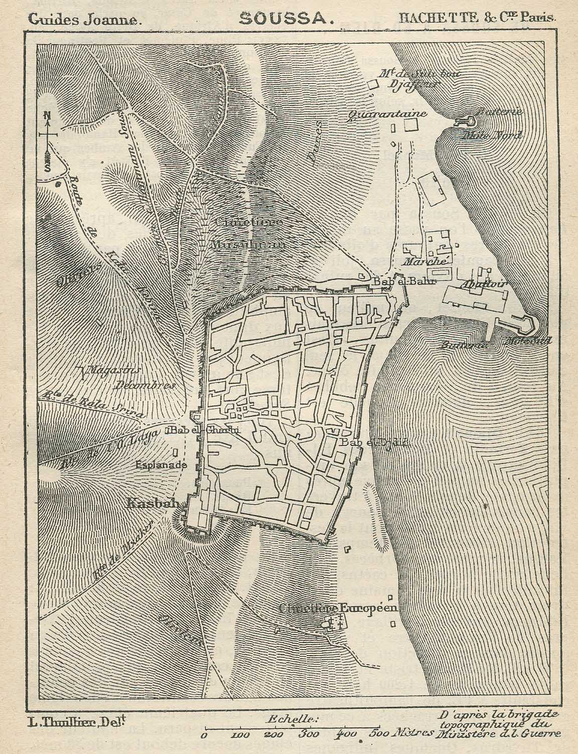 Plan de Sousse en 1888, Tunisie